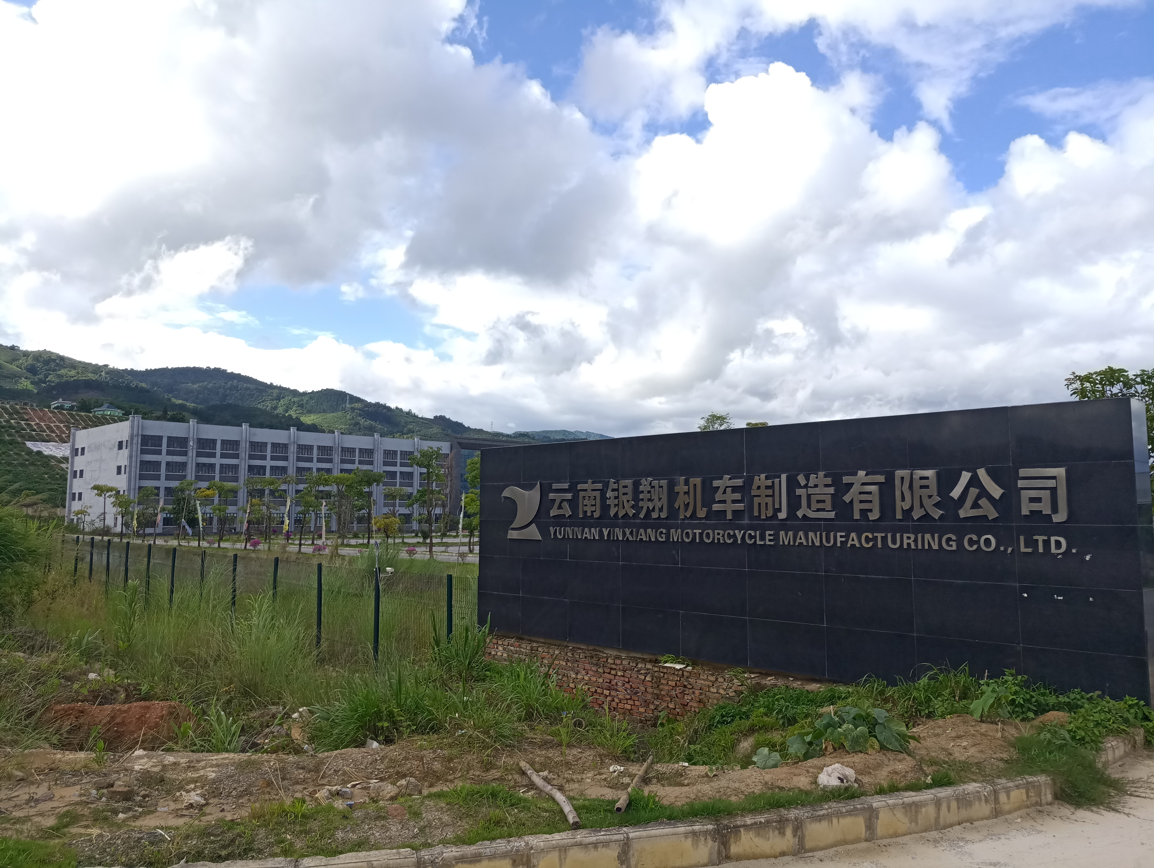 中文（中国大陆）: 瑞丽银翔摩托